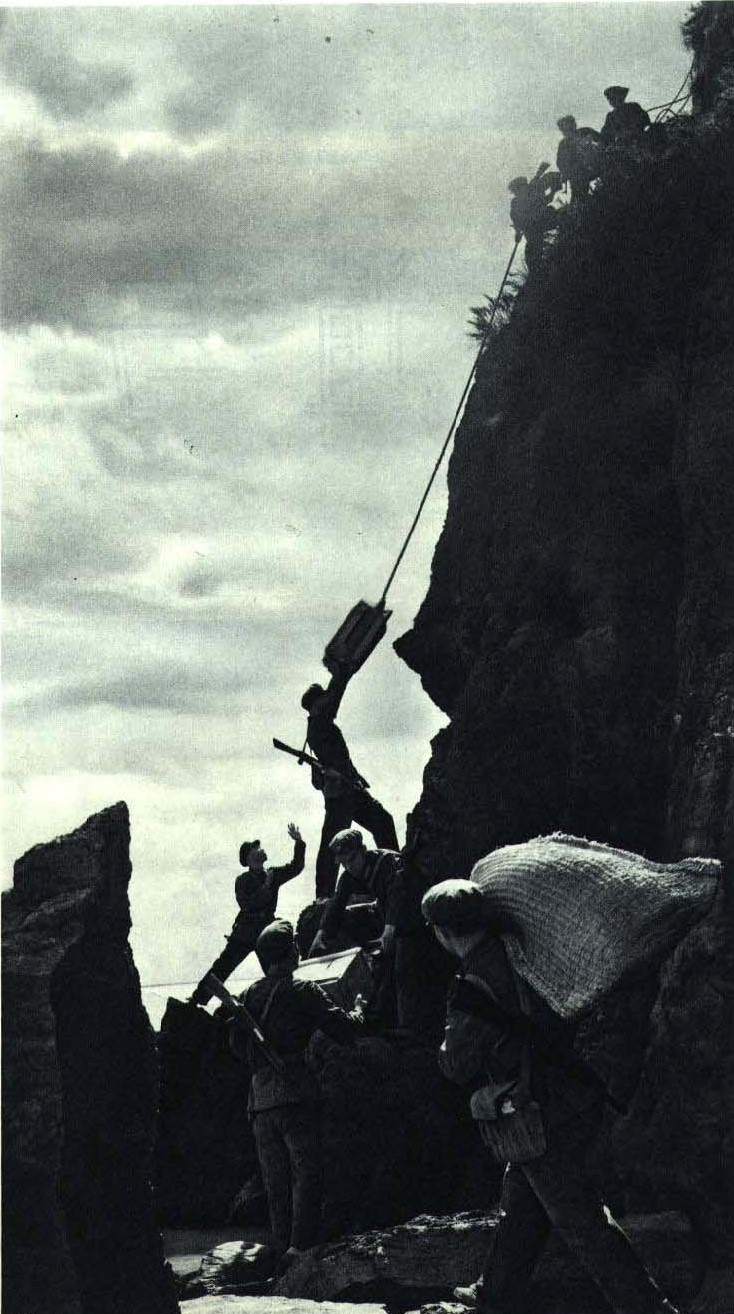 1965-10 1965年 航标兵